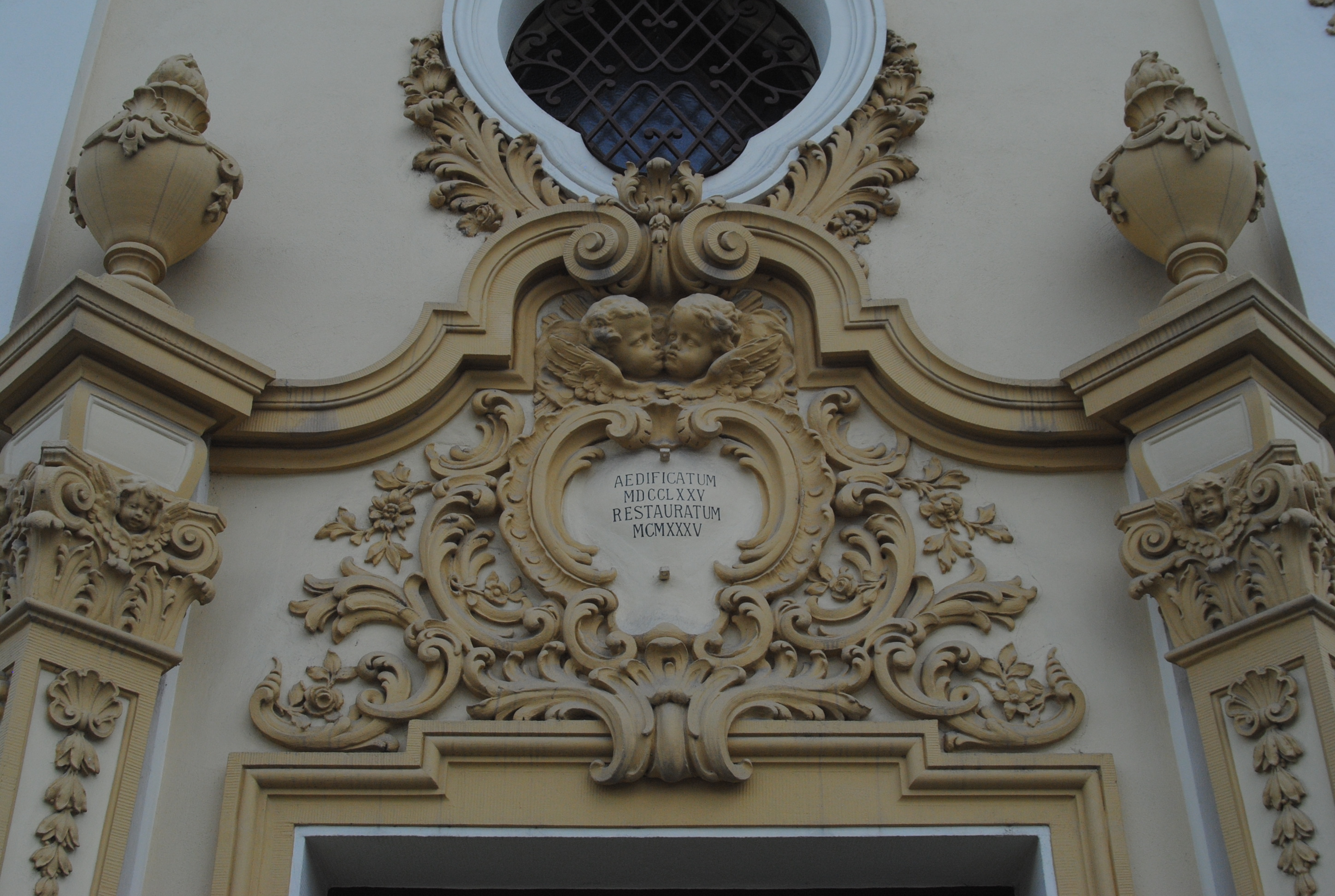 Biserica romano- catolică Iosefin, 1774